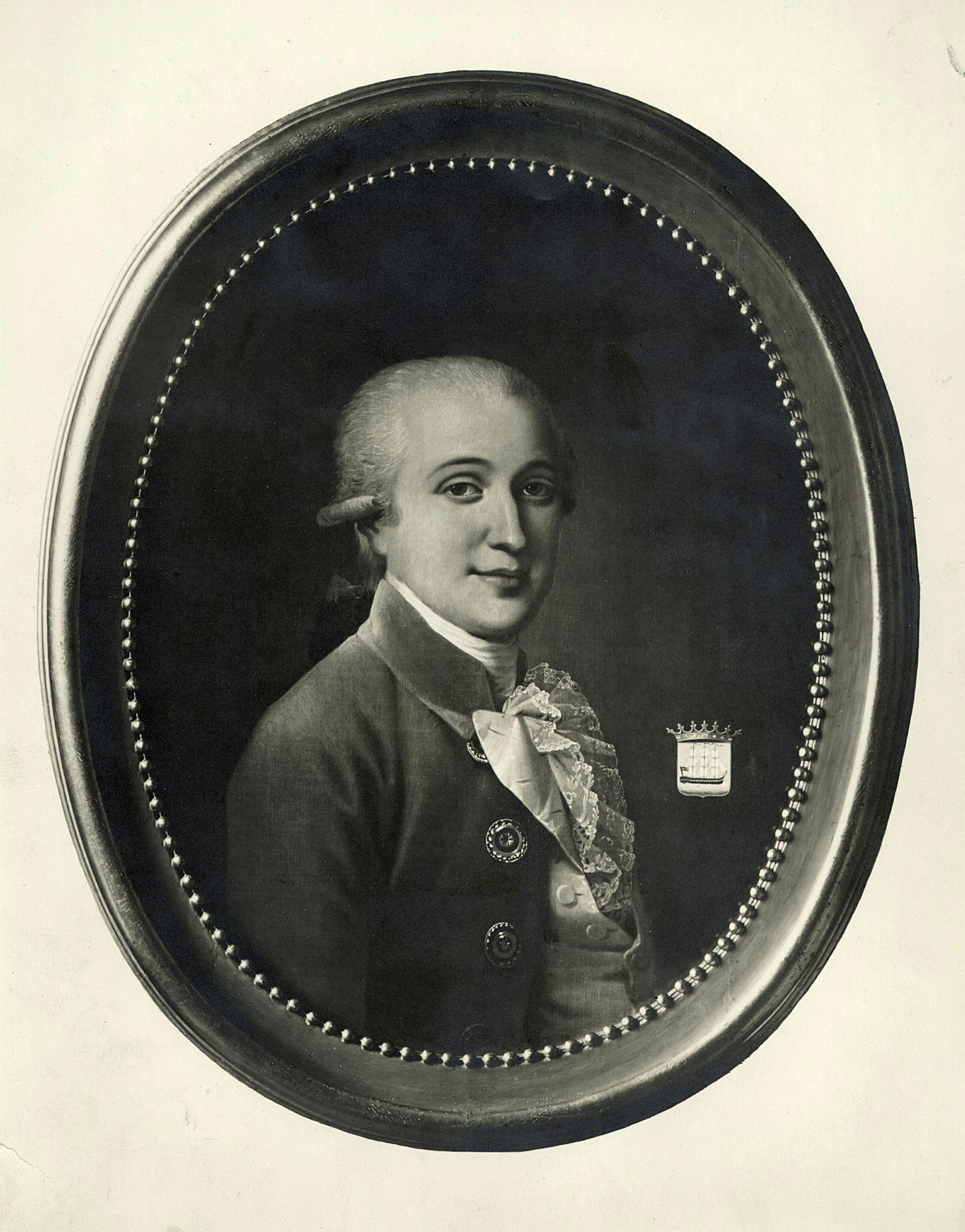 Frederik Adeler (1764-1816), Baron, Geheimestatsråd med kronet våpenskjold med fullrigger